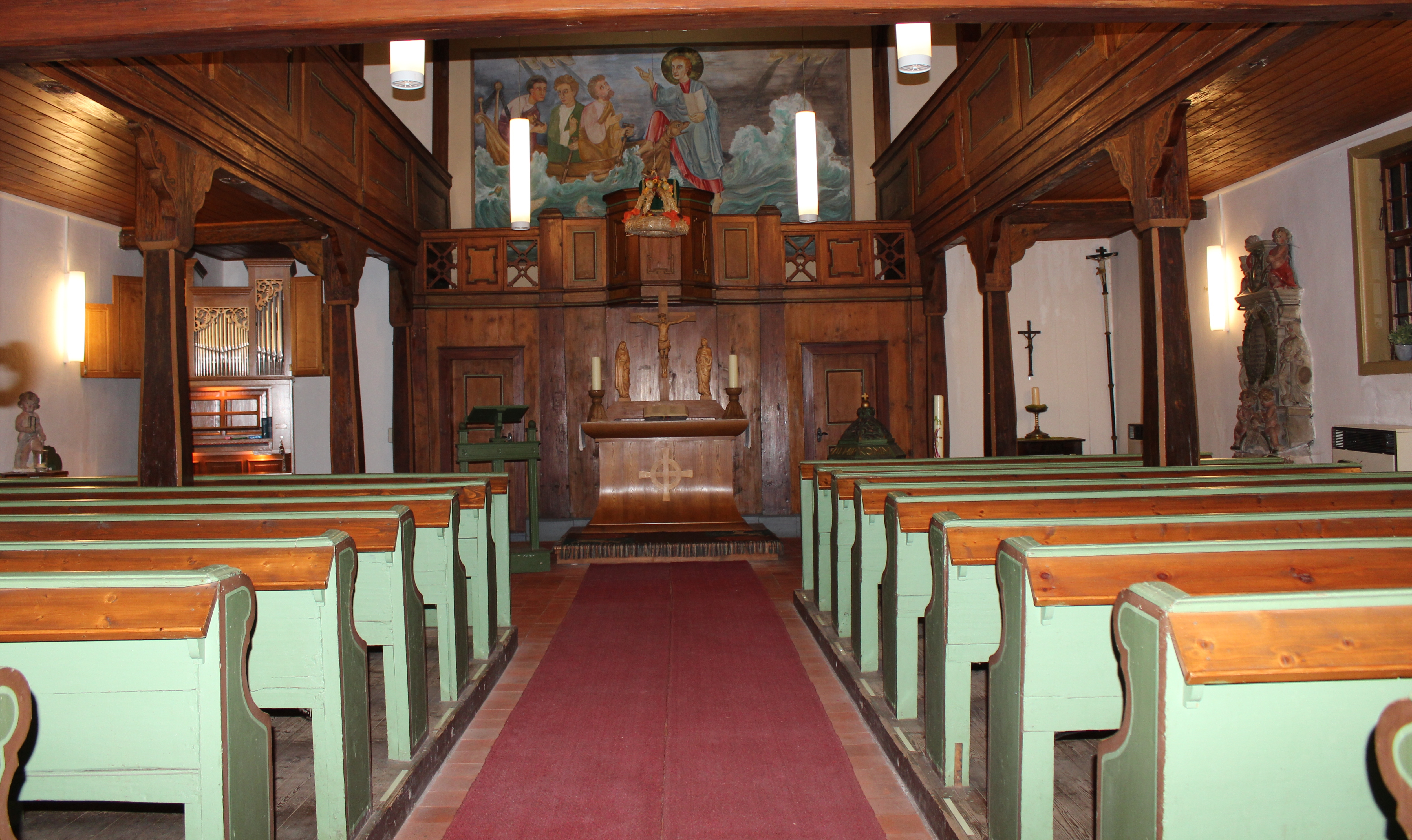 Ansicht Altarraum, Dreieinigkeitskirche Stützerbach